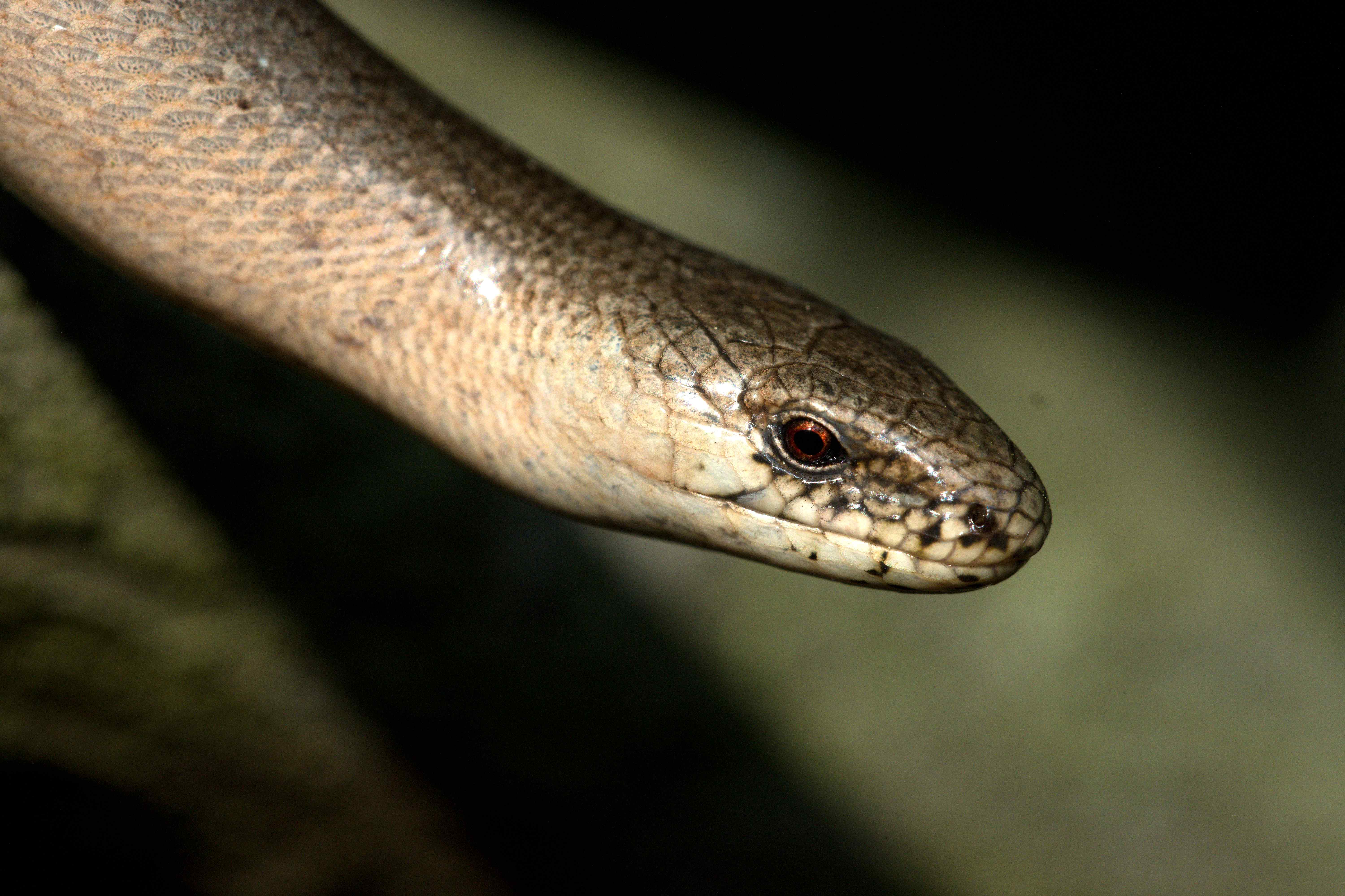 Slepýš křehký, detail hlavy